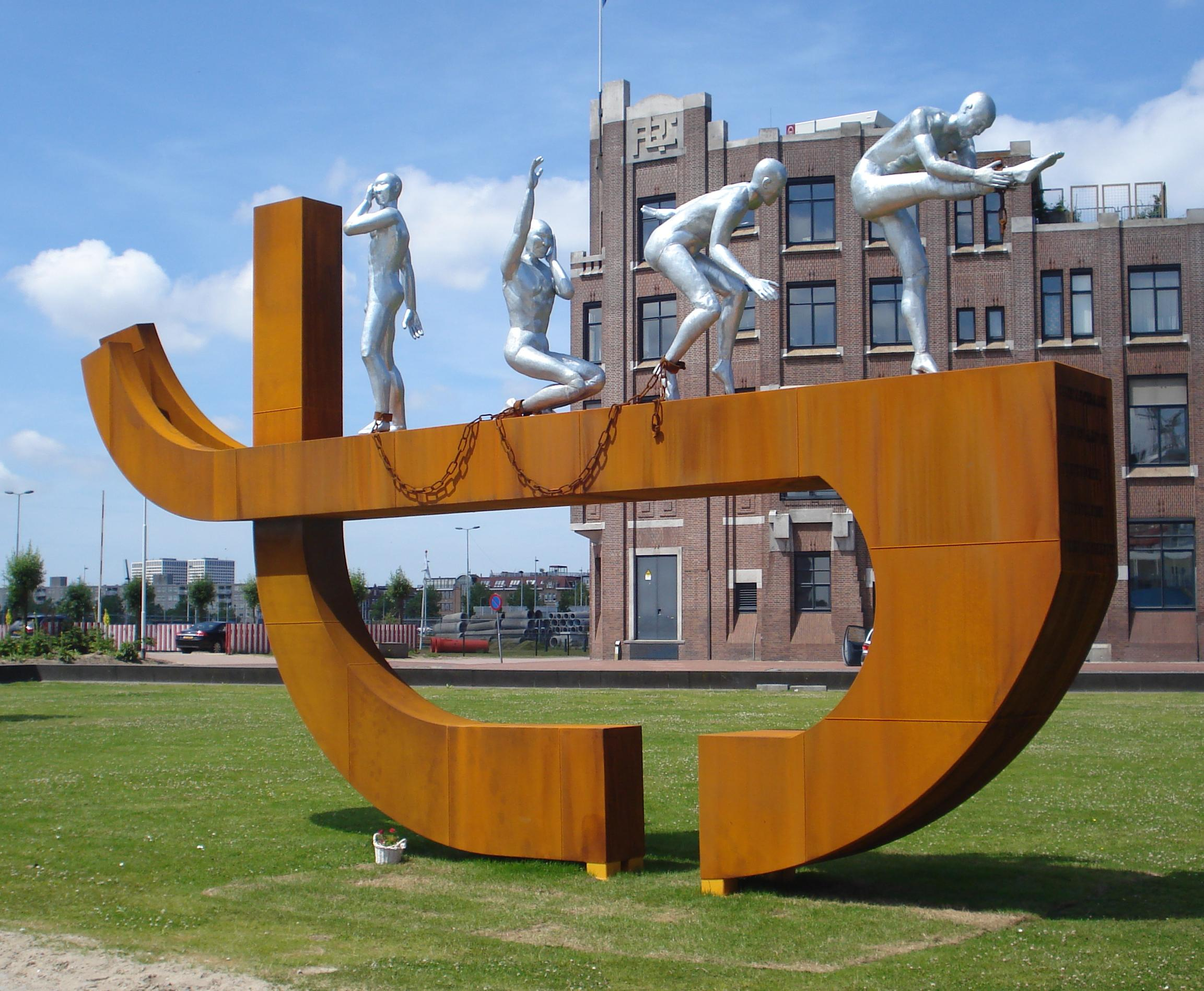 Zicht op het Kunstwerk het Slavernijmonument van Alex da Silva. Gelegen nabij de Lloydkade, in de wijk het Lloydkwartier, in Delfshaven in het westen van Rotterdam in Nederland The photographical reproduction of this work is covered under the article 18 of the Dutch copyright law, which states that “it is not an infringement of copyright to reproduce and publish pictures of a work, as meant in article 10, first paragraph, under 6°[1] or of an architectural work as meant in article 10, first paragraph, under 8°[2], which are made to be permanently located in a public place, as long as the work is depicted as it is located in the public space. Where incorporation of a work in a compilation is concerned, not more than a few of the works of the same author may be included”. [1] drawings, paintings, works of architecture and sculpture, lithographs, engravings and the likes [2] drafts, sketches and three-dimensional works relating to architecture, geography, topography or other sciences Note that photographs are not included in Item 6. They are separately listed at Item 9 and are therefore not covered by FOP. See COM:CRT/Netherlands#Freedom of panorama for more information. .